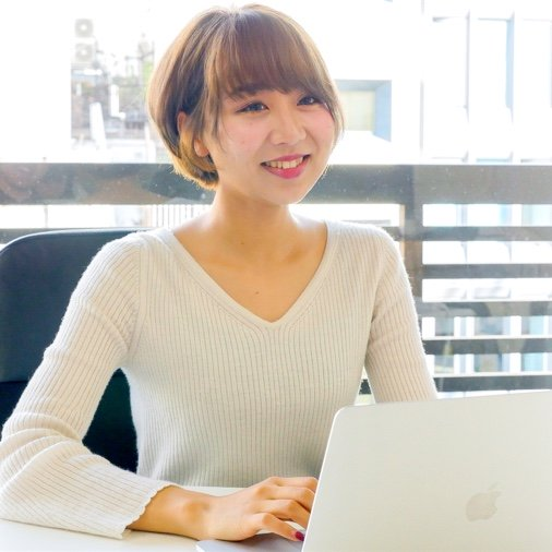 編集長写真